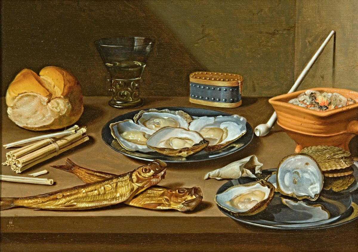 Het Stilleven met haringen, oesters en rookgerei dateert uit omstreeks 1625 en verkeert in uitzonderlijk goede staat. Het toont een veelvoud aan verleidelijke luxeobjecten: witbrood en wijn en glanzend verse oesters, ook toen al bekend als lustopwekkend. De pijp rechts staat klaar om te worden aangestoken; links ervan een chique tabaksdoosje, rechts een schaal met kooltjes en uiterst links de aansteekstokjes. Op de haring na waren al deze zaken voorbehouden aan de welgestelden uit de 17e eeuw. Het waren genotmiddelen en daarom geregeld het mikpunt van kritiek van moralisten. Floris van Schooten was een tijdgenoot van de vroegste Haarlemse stillevenspecialisten Floris van Dijck (circa 1575-1651) en Nicolaes Gilles (werkzaam circa 1612 –circa 1632). Van Schootens stilleven volgt in opzet deze tijdgenoten. Hij kiest voor een hoge horizon, plaatst de objecten naast elkaar en gebruikt heldere kleuren. Maar hij ging ook met zijn tijd mee. Vernieuwend hier is het lichtspel op de muur en het eenvoudige houten tafelblad, wat doet denken aan de latere 'monochrome banketjes' van Pieter Claesz. (1597/8 – 1660) en Willem Claesz. Heda (1594-1680). Het Frans Hals Museum bezit nog twee werken van Floris van Schooten; een Keukenstuk uit 1620/25 en een Stilleven met ham en kaas uit 1638/40. Werk van de kunstenaar is zeldzaam; er zijn slechts drie andere stillevens van hem in Nederlandse musea aanwezig. Het Stilleven met haringen, oesters en rookgerei hing van 1953 tot 2003 al in het Frans Hals Museum als bruikleen van het Instituut Collectie Nederland. In 2003 werd het via de restitutiecommisssie teruggegeven aan de rechtmatige eigenaren. Het Frans Hals Museum is erg blij met de terugkomst van het stilleven. Het vormt een belangrijke verbinding tussen de vroege stillevens van Floris van Dijck en de latere werken van Claesz. en Heda. Hoofdinformatie Aankoopjaar 2012